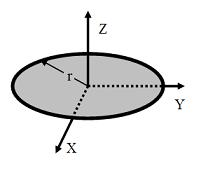 圓盤形